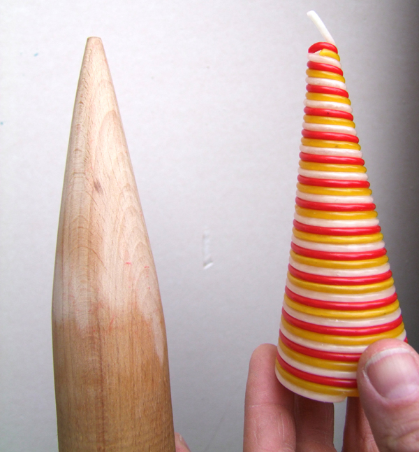 Newweling